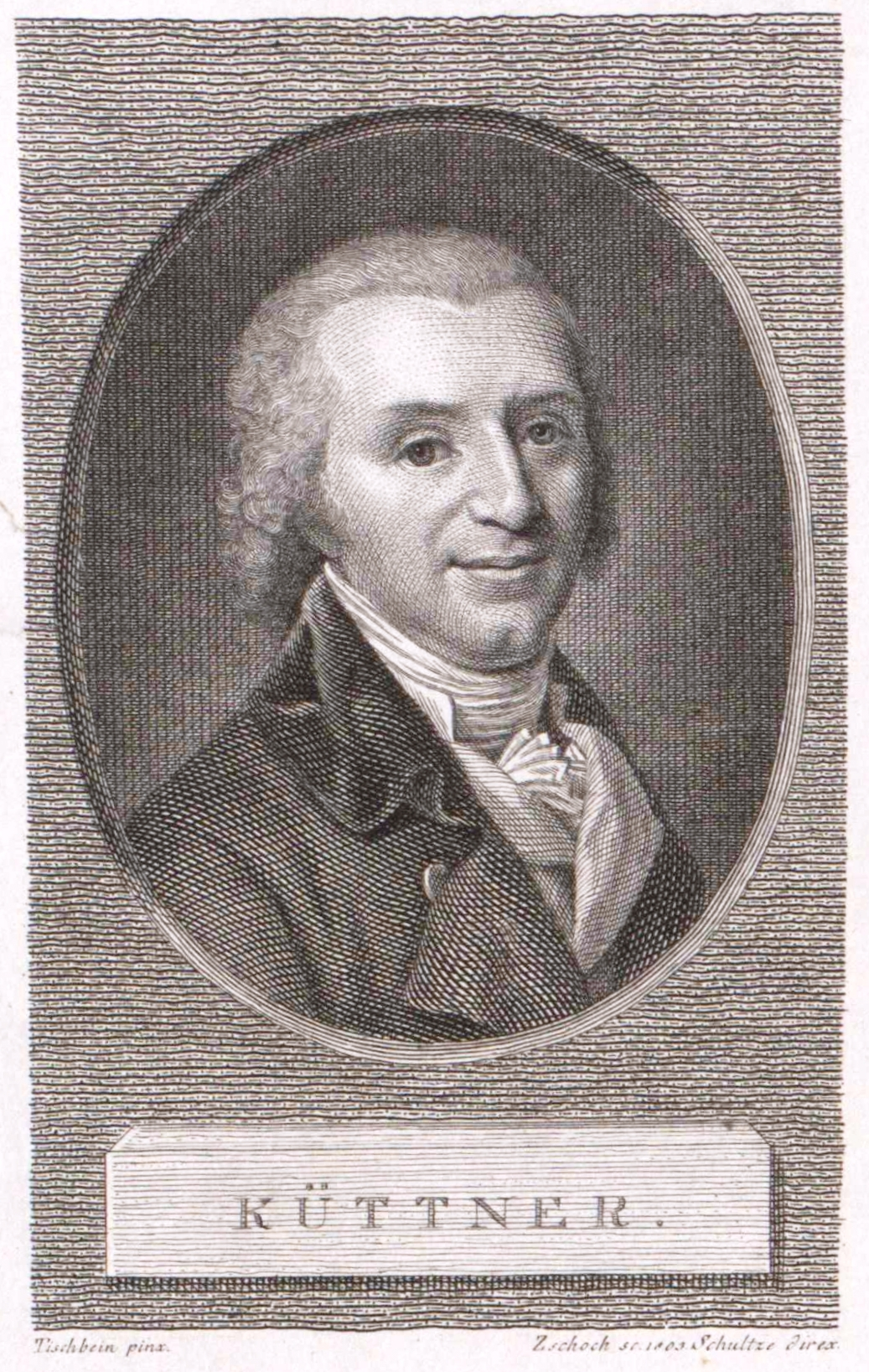 Karl Gottlob Küttner (1755–1805), Stich von Christian Gottfried Zschoch (1775–1833) nach Johann Friedrich August Tischbein (1750–1812)